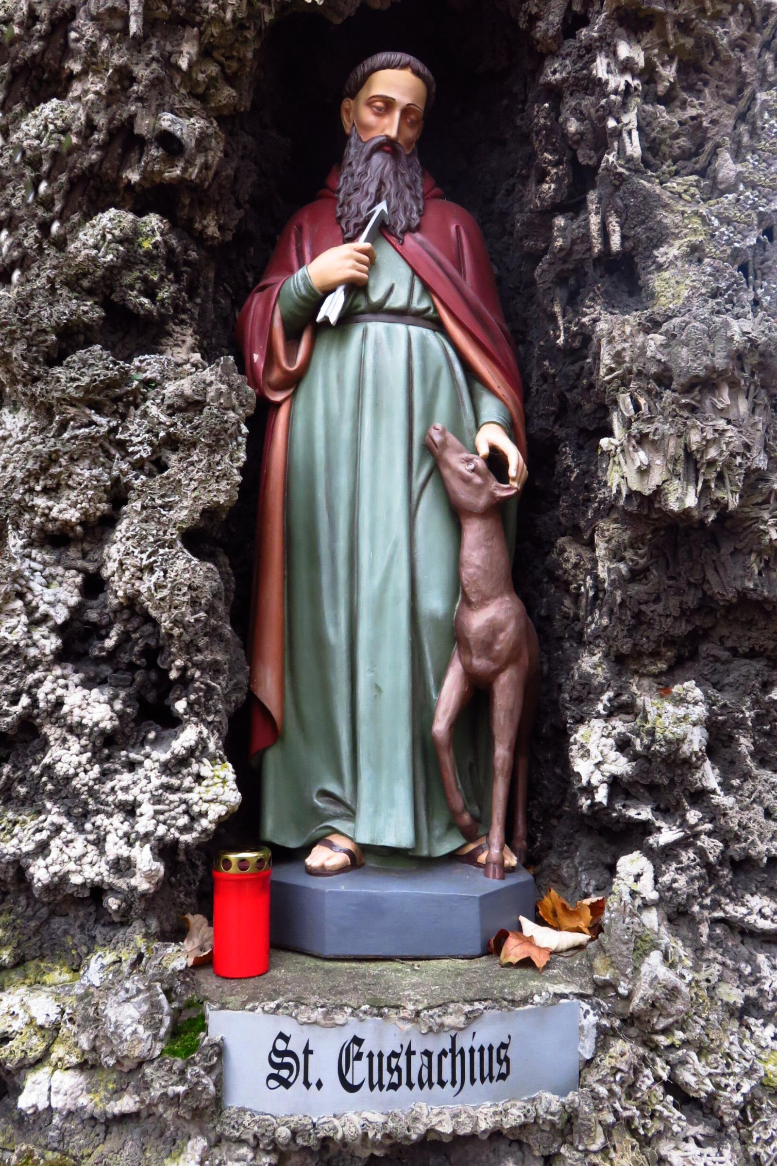 Grottenanlage in Hehn Heiligenpesch / Christliche Figuren in Mönchengladbach